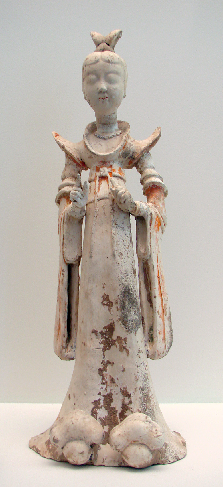 Dame de Cour. Chine du Nord, dynastie Tang, fin 7ème-début 8ème siècle, terre cuite. Musée Guimet, Paris.